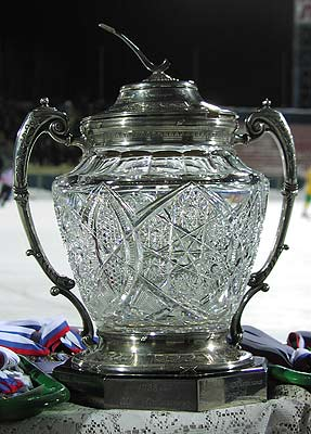 Кубок России (СССР) по хоккею с мячом